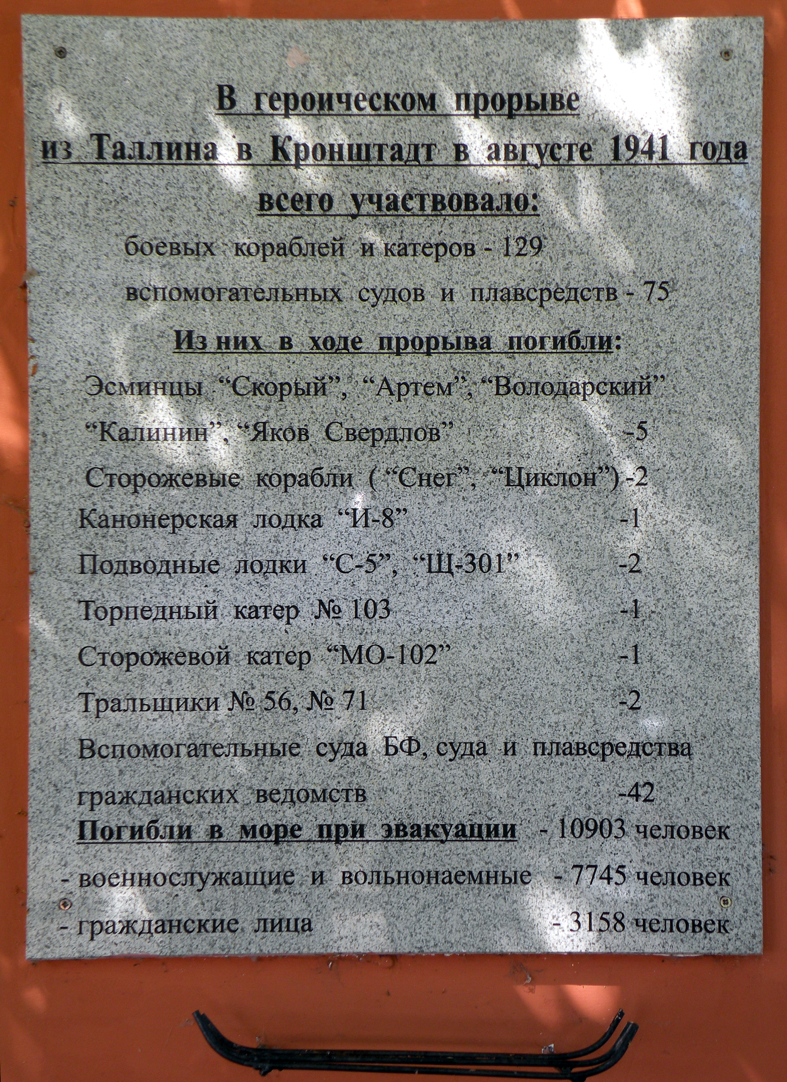 Память о Балтийской катастрофе